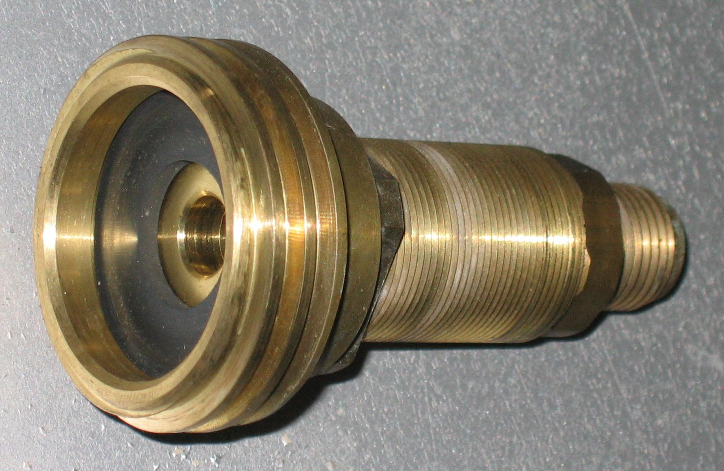 Autogas filler (bare)